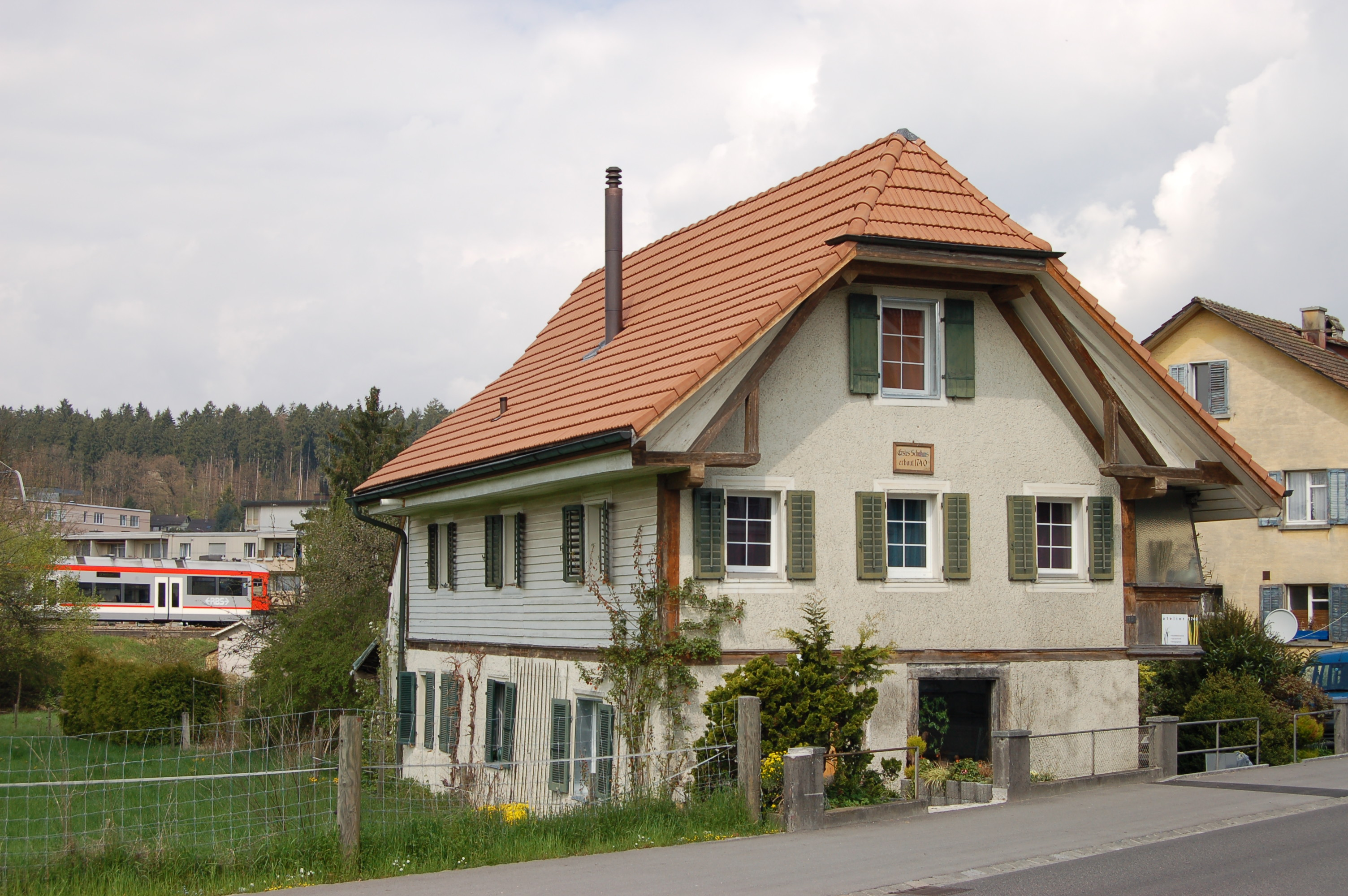 Altes Schulhaus Biberist